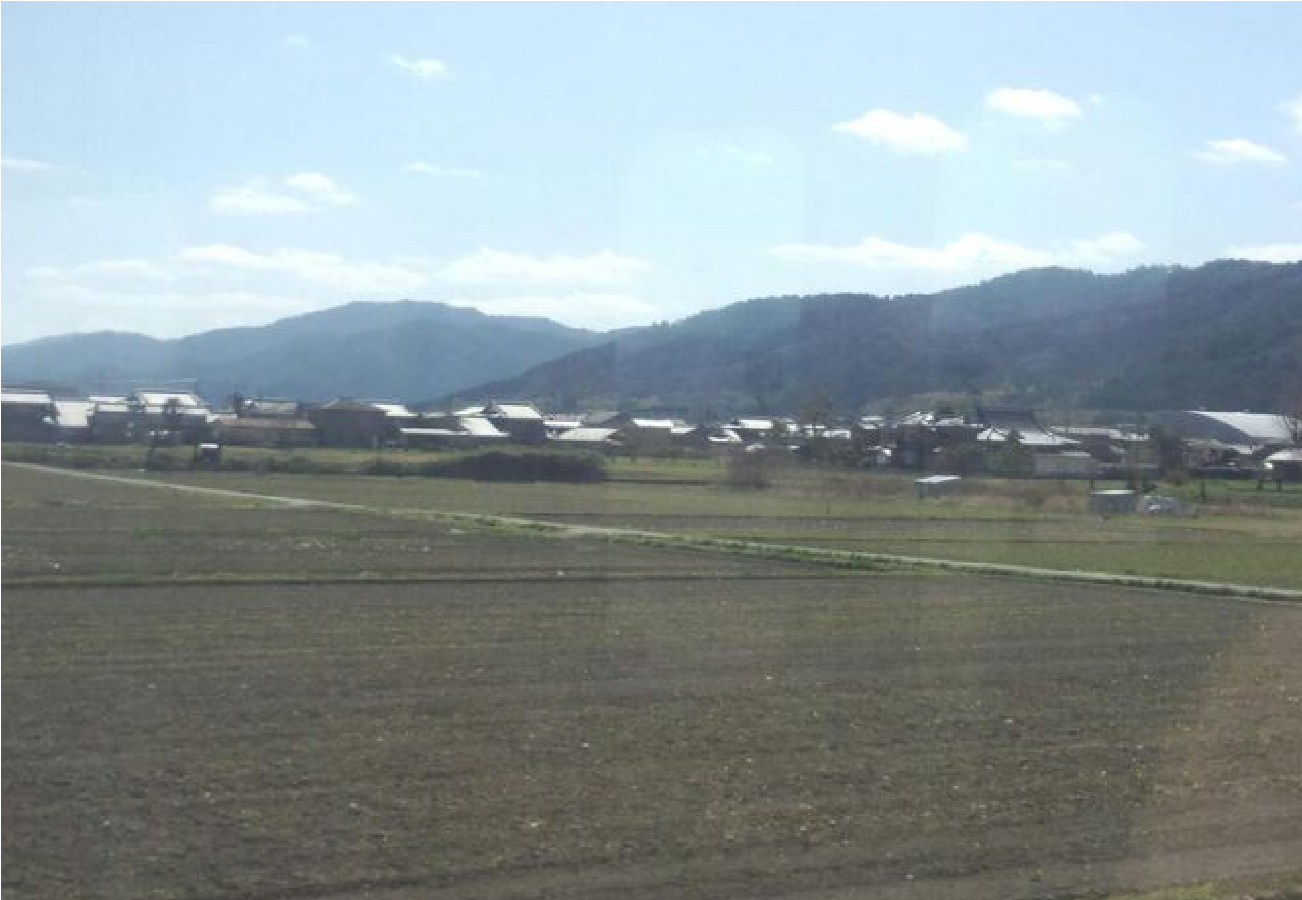 鴻応山を亀岡側より遠望。